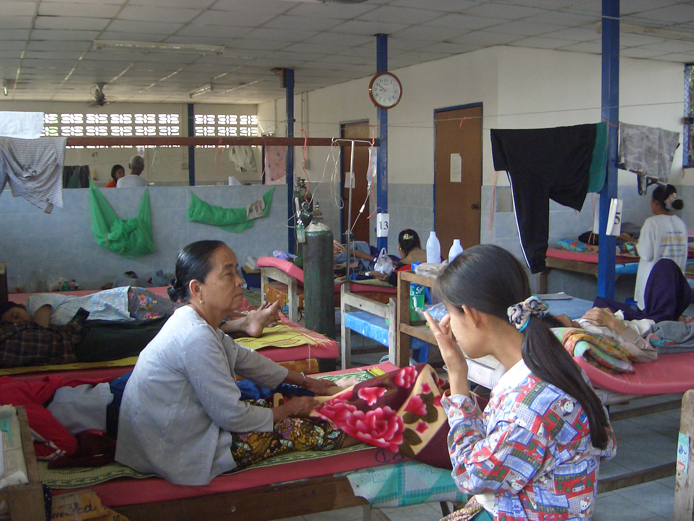 Mae Tao Klinik Mae Sot